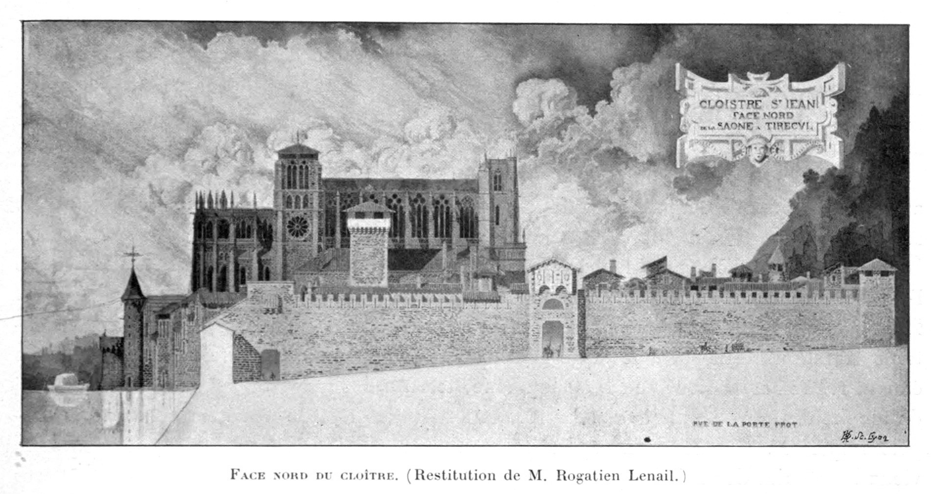 Illustrations pour l'Histoire des églises et chapelles de Lyon